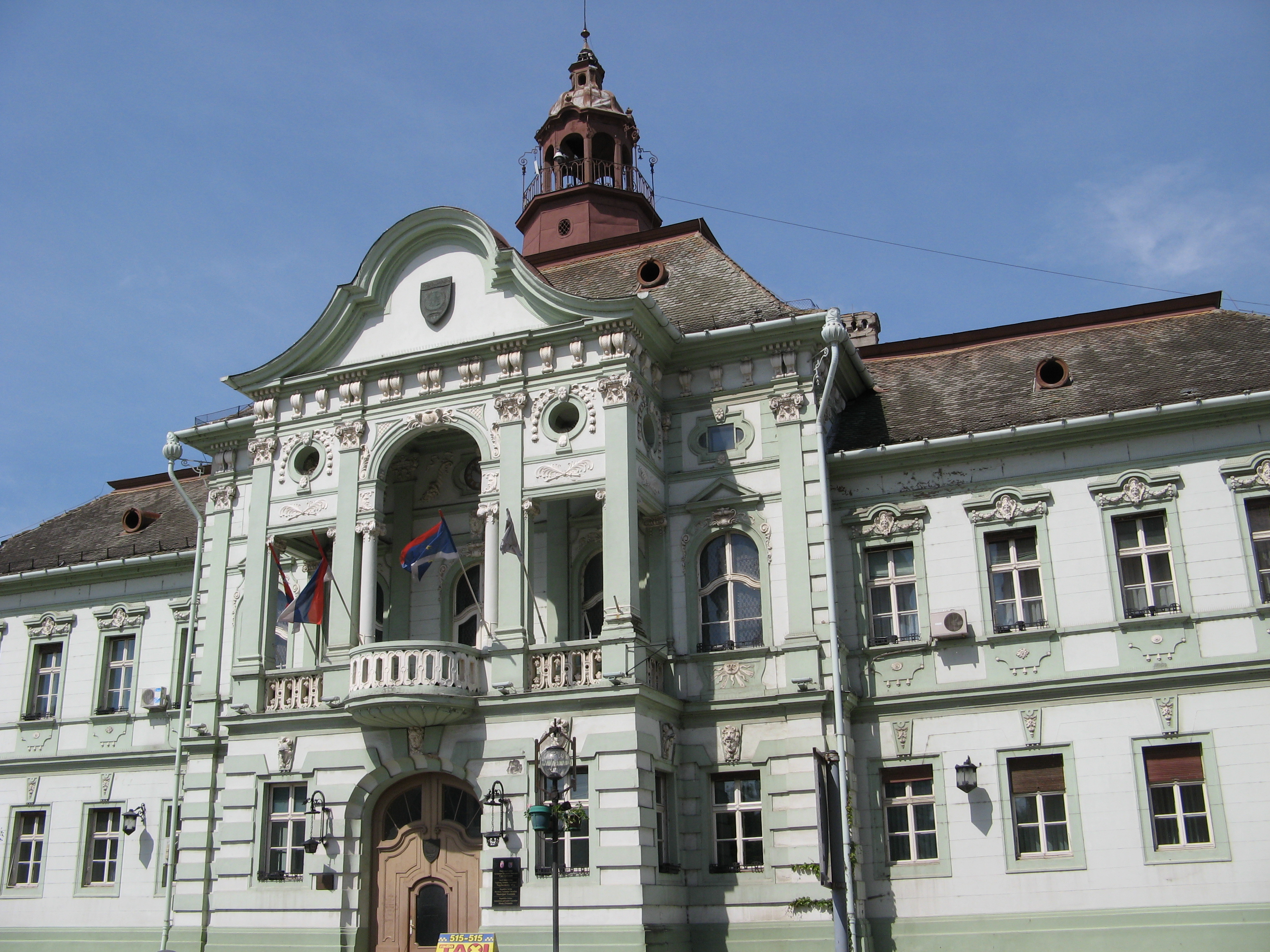 Старо језгро Зрењанина. Градска кућа